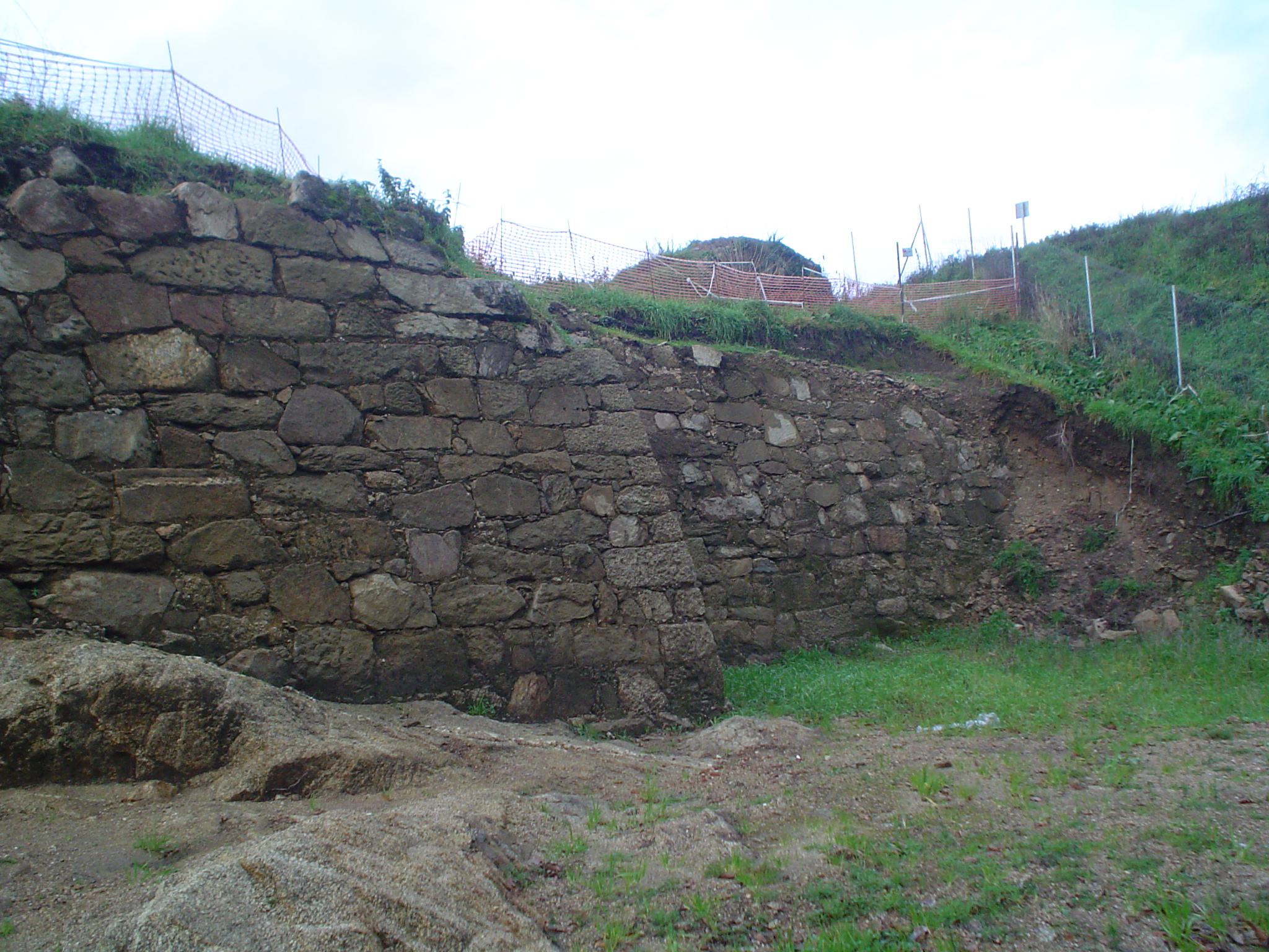 Castelo da Rocha forte. Conxo - Santiago. Muro do surleste